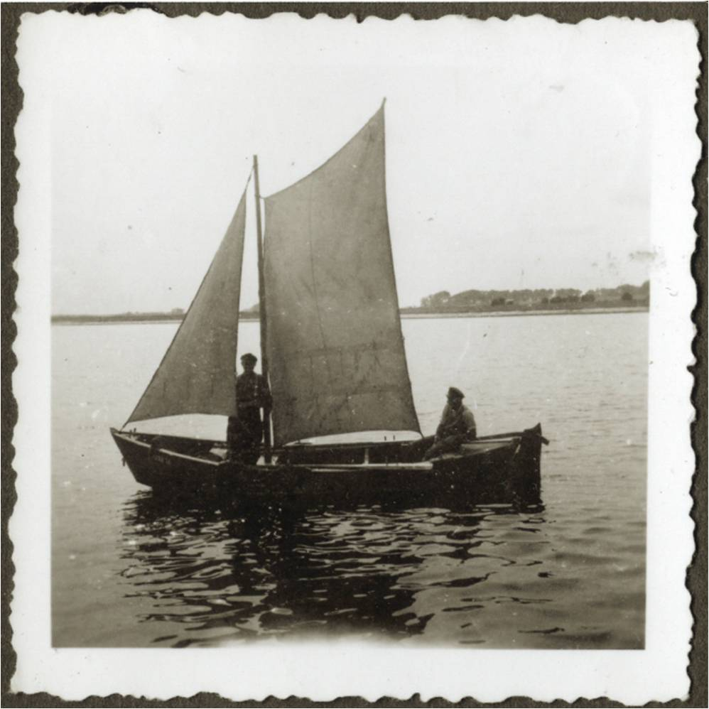 Schwarz weiß Foto eines Sicken unter Segel